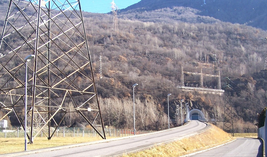 Sellero, Centrale idroelettrica di S. Fiorano , Val Camonica, Italia